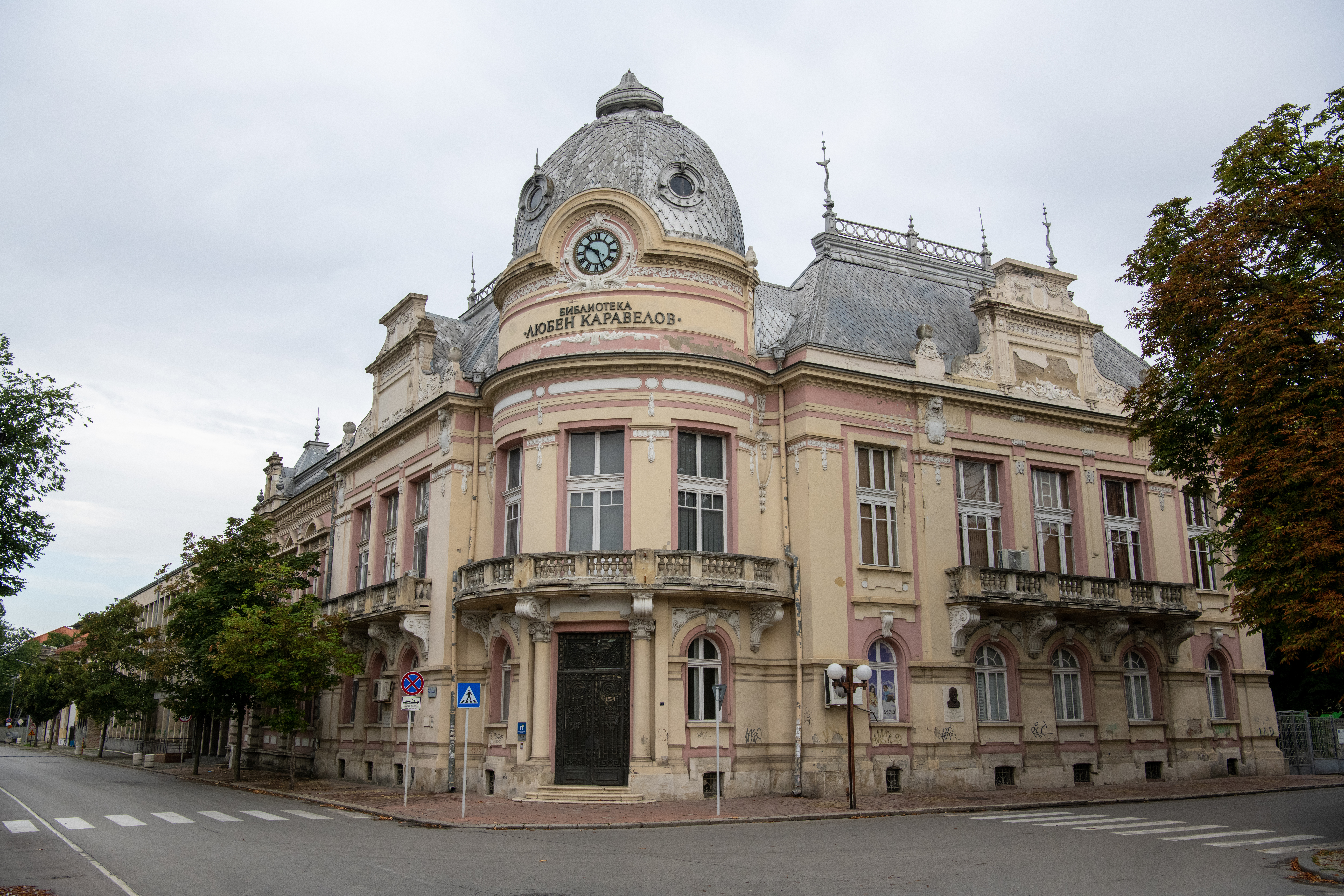 Снимката документира библиотеката „Любен Каравелов“ в град Русе.